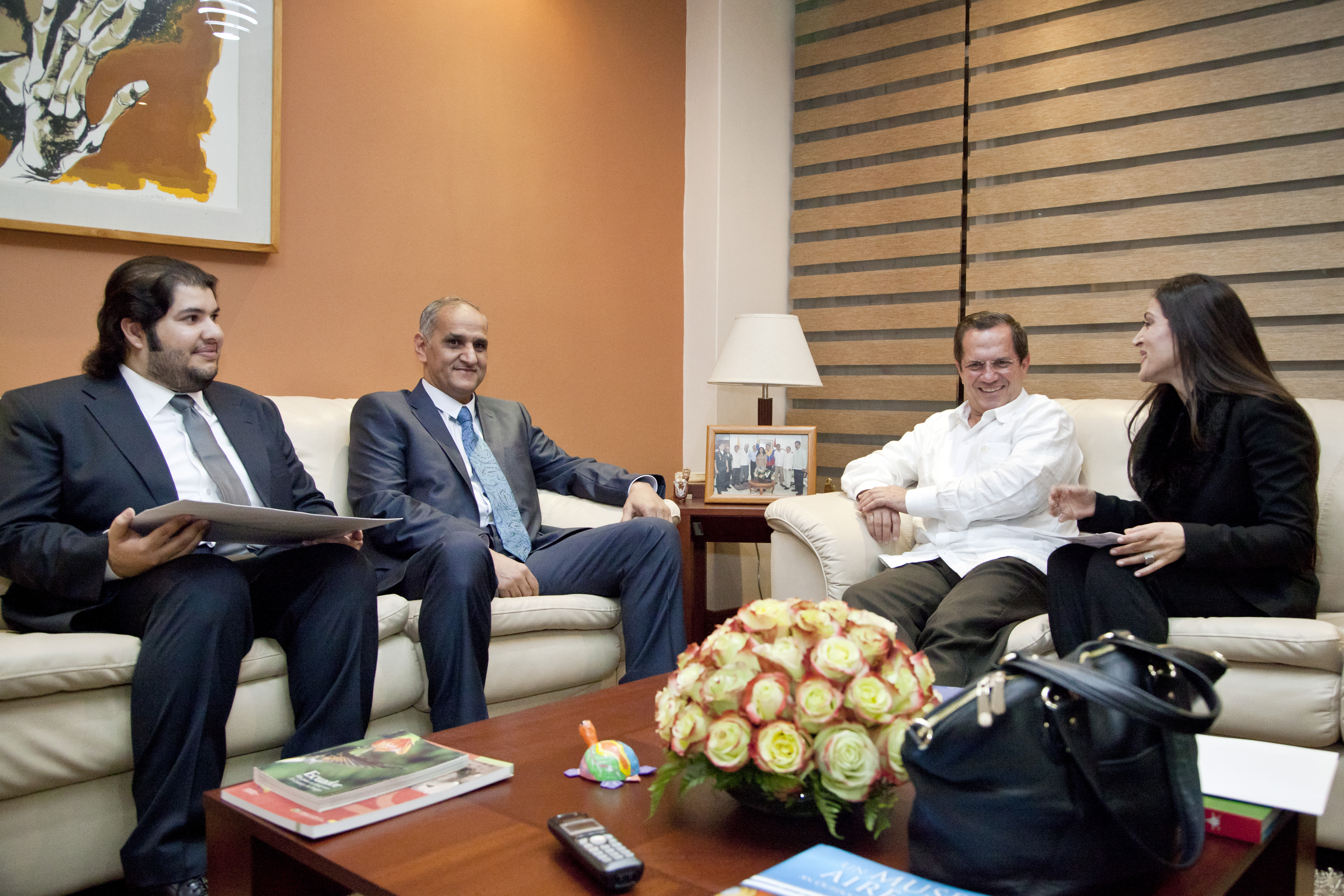 Quito (Ecuador), 16 de septiembre 2013. El Embajador de Catar, Hassan Al-Malki, entregó copia de Cartas Credenciales al Canciller Ricardo Patiño. Foto: Fernanda LeMarie - Cancillería del Ecuador.